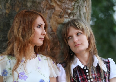 Елена Войнаровская и Ольга Пулатова